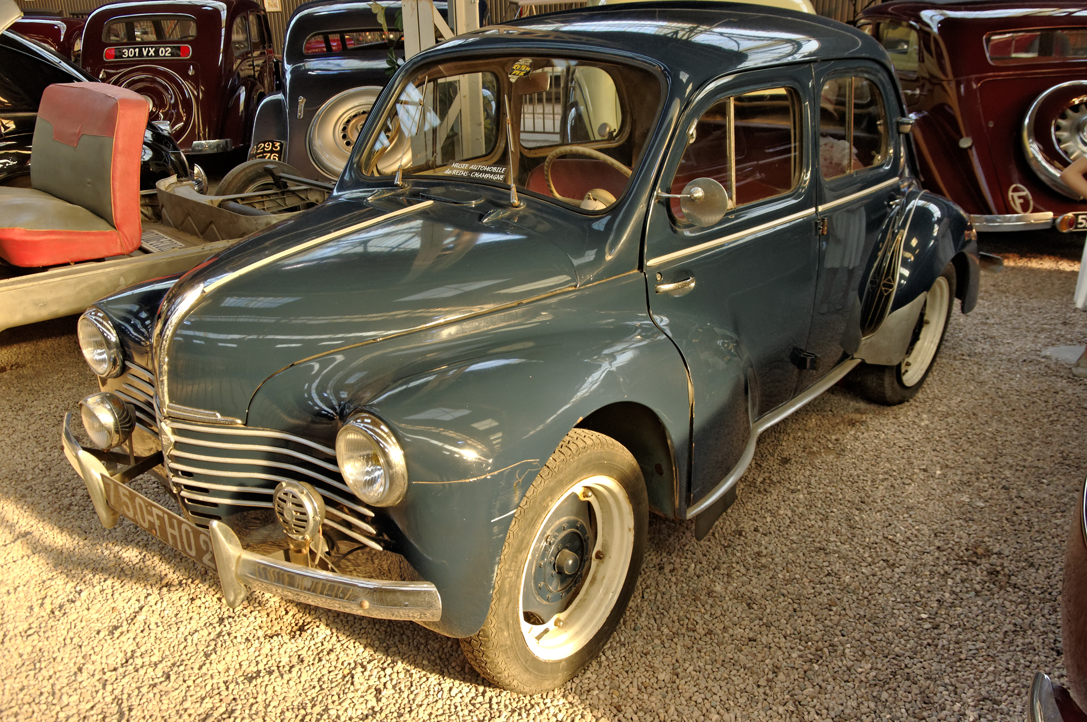 Renault 4CV (1952), Berline, 4 cyl. en ligne, soupapes en tête, 747 cm3, 21 ch. S.A.E., vitesse max. 100 km/h(Musée Automobile Reims Champagne, Reims, Marne, France)